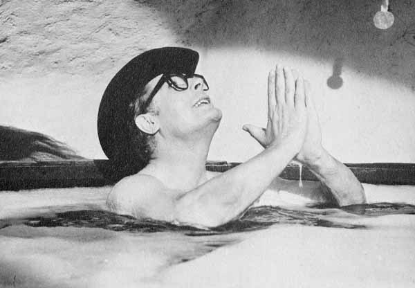 Marcello Mastroianni in un fotogramma di 8½, film di Federico Fellini del 1963.